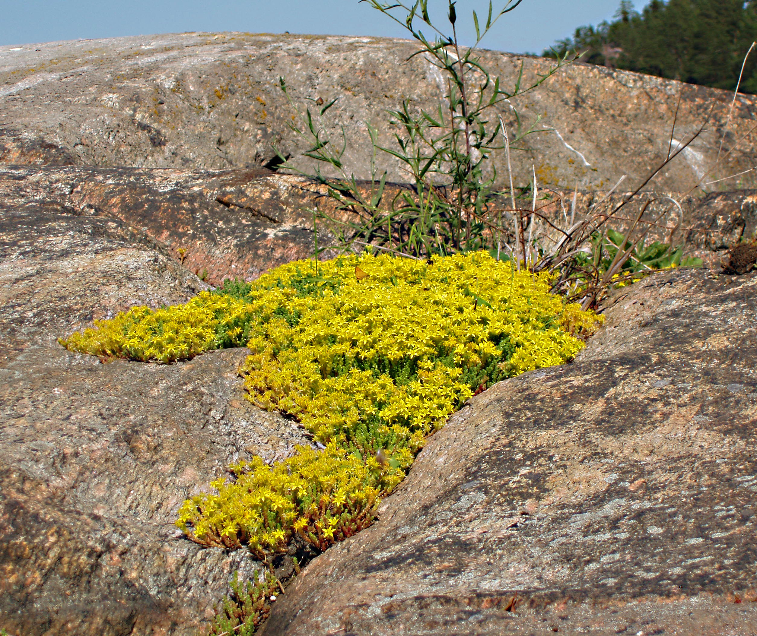 Gul fetknopp (Sedum acre). En vanlig växt i bergsskrevor på karga klippor med mager jordmån i den svenska skärgården där det ansamlas regnvatten.